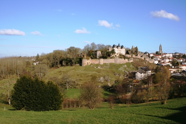 Français